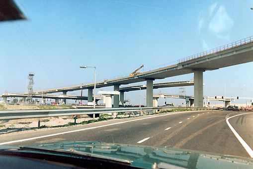 Bouw Prins Clausplein, A12 richting Utrecht thv huidige afslag Rotterdam/Amsterdam